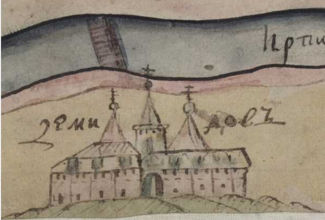 Фрагмент карти Київської губернії. XVIII століття. РГАДА, ф. 192, оп. 1, Киевская губ., № 5.